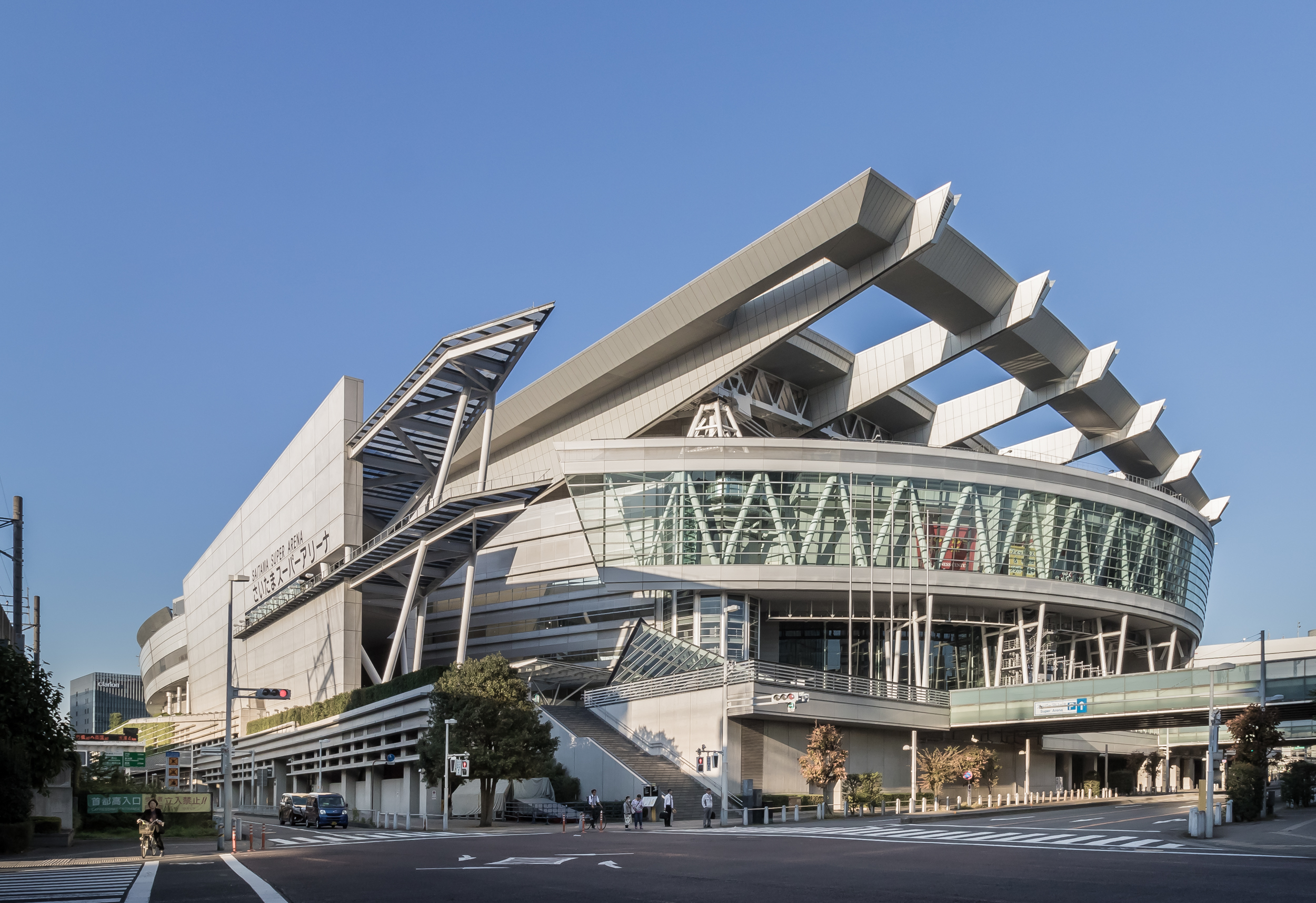 さいたまスーパーアリーナ。MAS・2000共同設計室（代表：日建設計）, ダン・マイス設計。